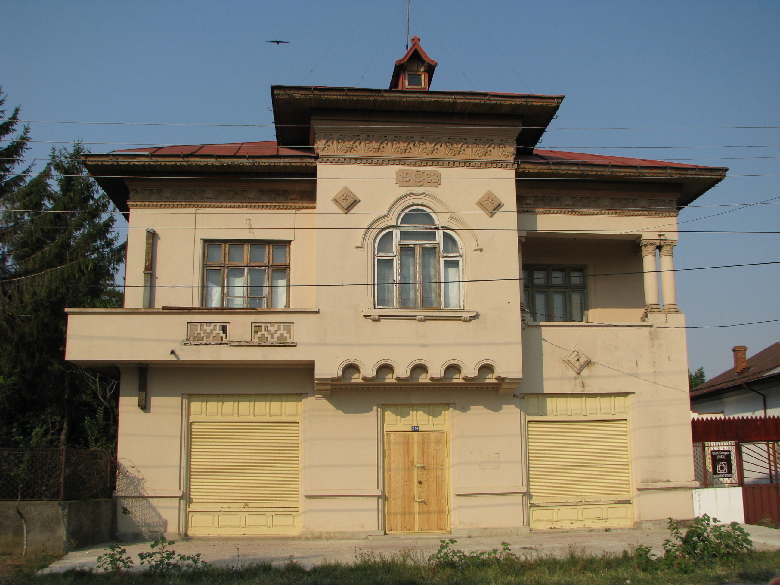 Casa Stan Cangea, fost Cămin cultural